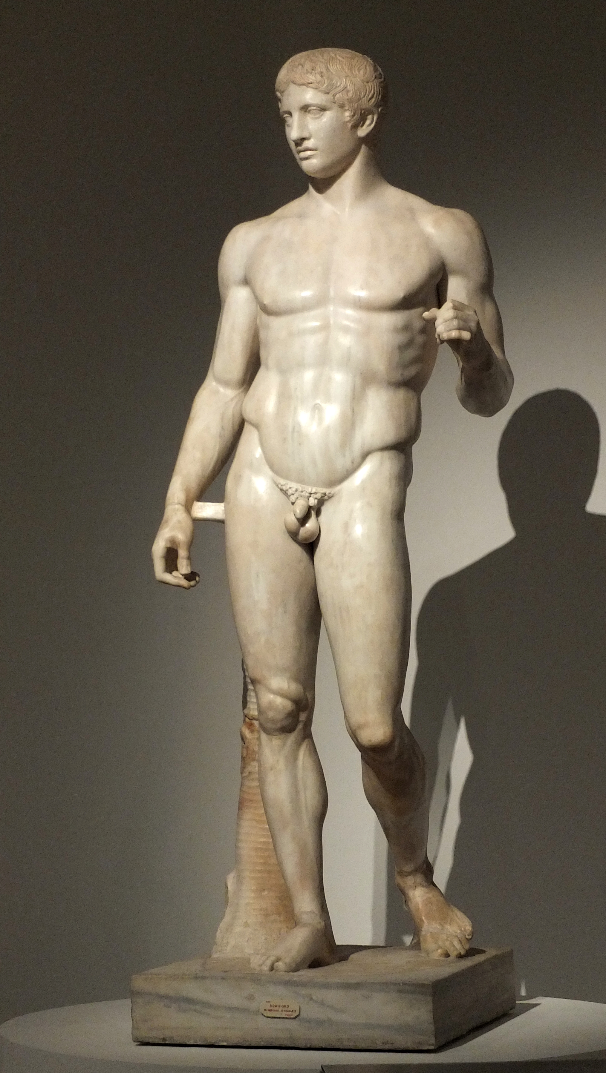 Doryphore d'après Polyclète, exemplaire du musée de Naples, lors de l'exposition Moi, Auguste, Empereur de Rome, 19 Mars 2014 - 13 Juillet 2014, Grand Palais, Paris